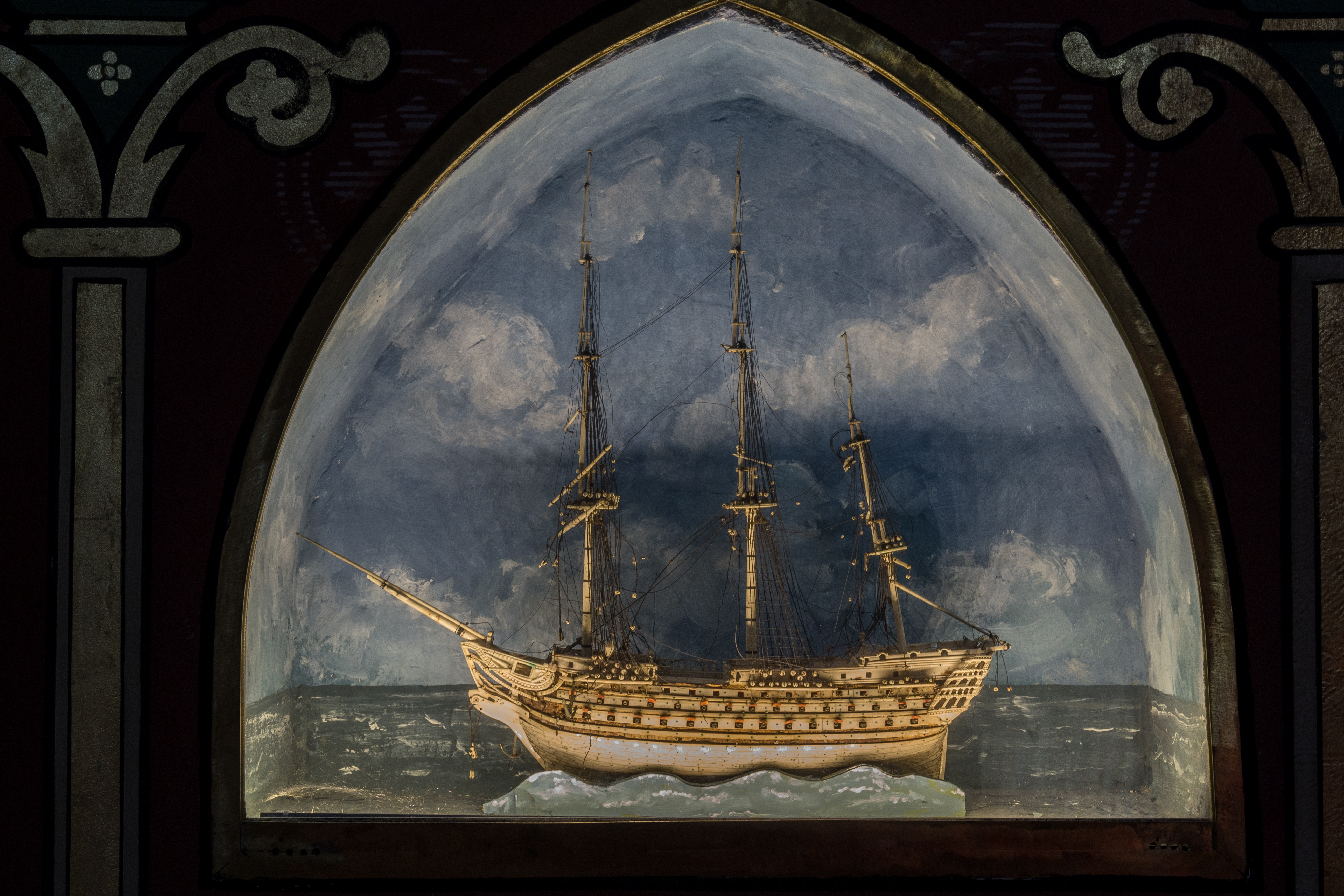 Chapelle de Condat Libourne Gironde